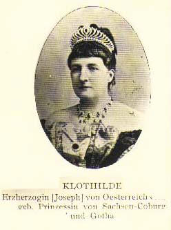 Erzherzogin Clotilde.